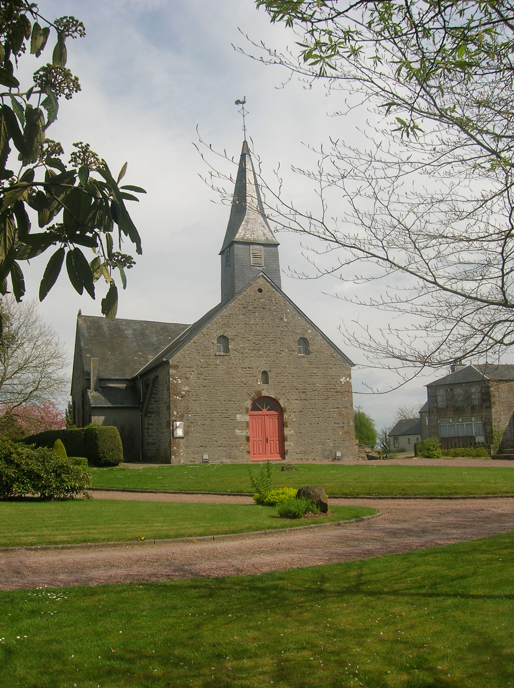 Eglise St Céneri Commune d'Aubusson (Orne)